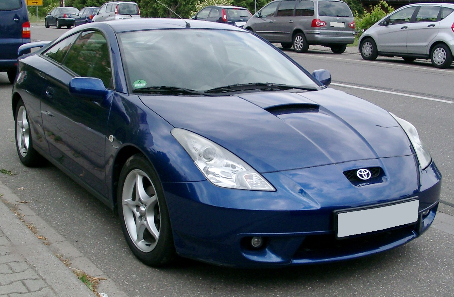 Toyota Celica